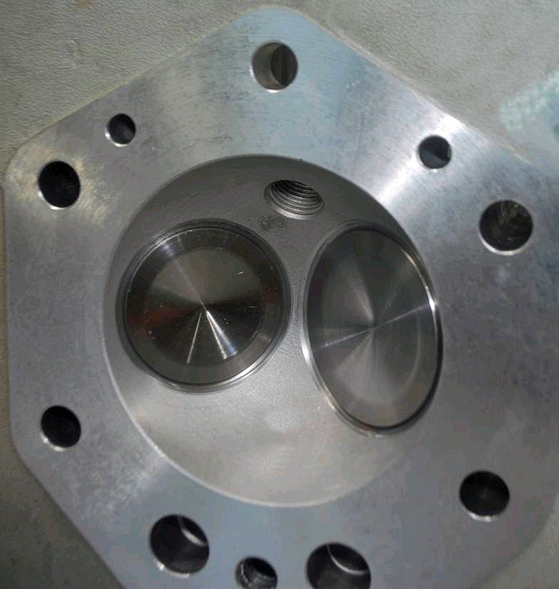 V11 isot venttiilit